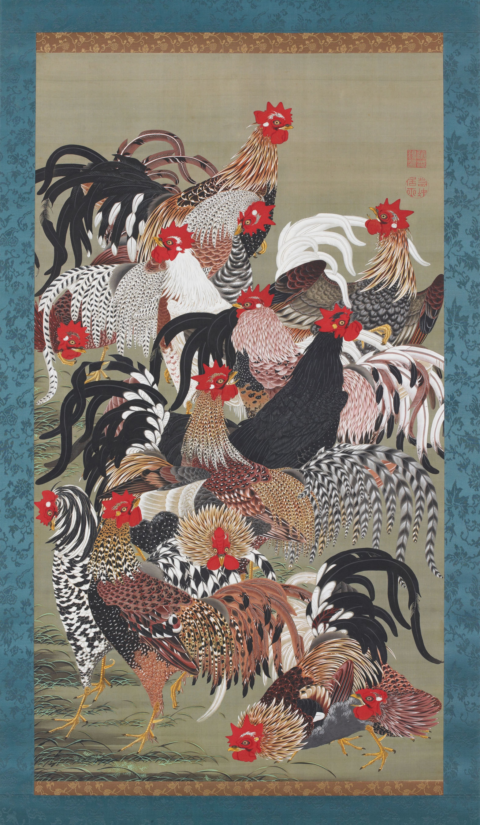 Ito Jakuchu's Gunkeizu.